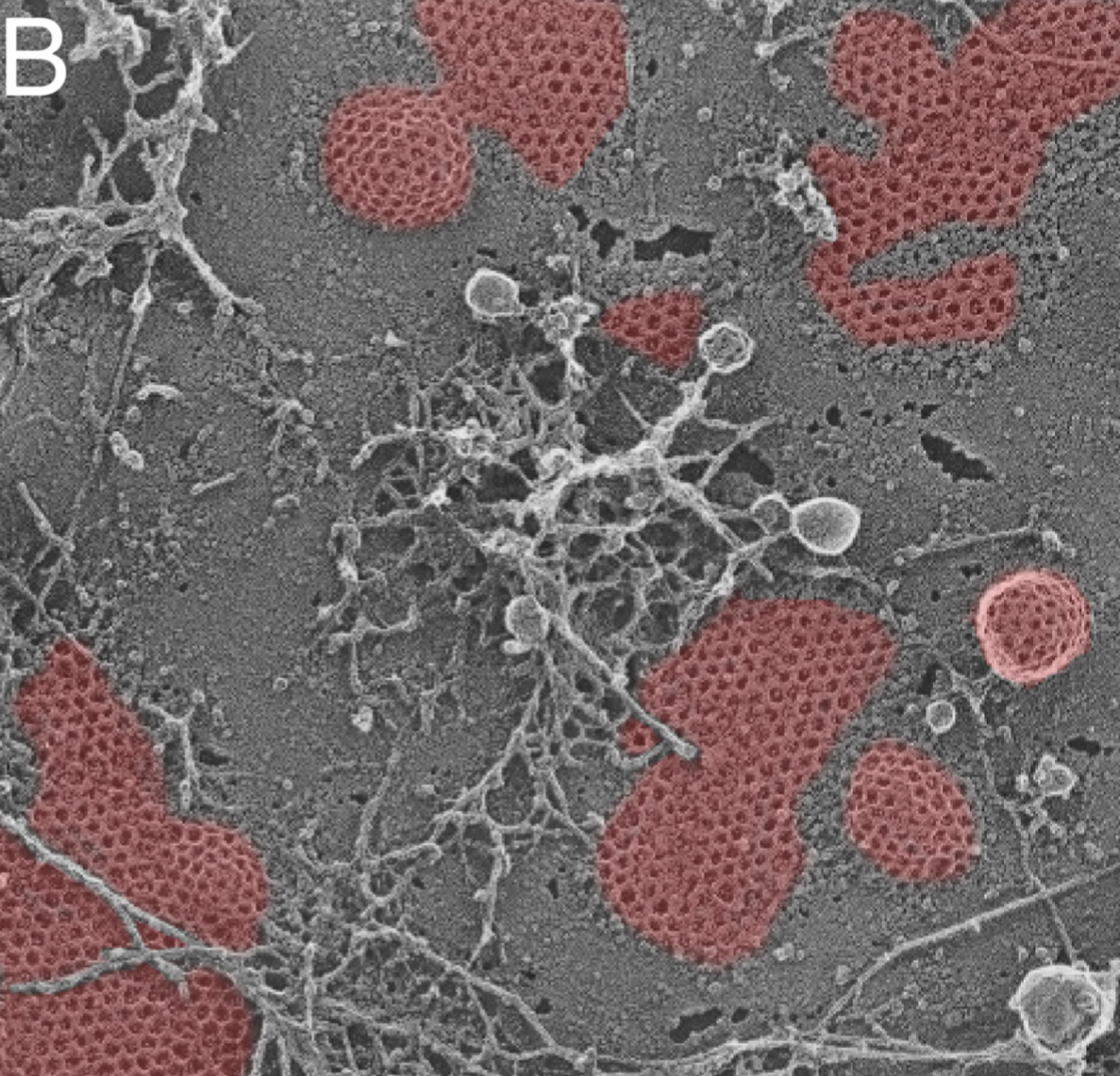 Figura 2. Morfología de las estructuras recubiertas de clatrina en la superficie celular. (B) Imagen EM de congelación y grabado de la superficie adherente de una célula cultivada, que muestra estructuras de clatrina poligonales incipientes planas y redondeadas (pseudocoloradas en rojo) en la membrana plasmática y la proximidad de las vesículas incipientes a las láminas planas.